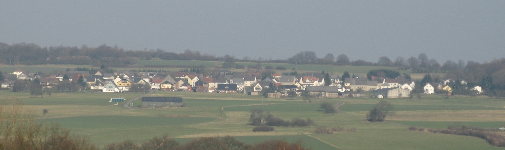 Ortsansicht von Reichenborn